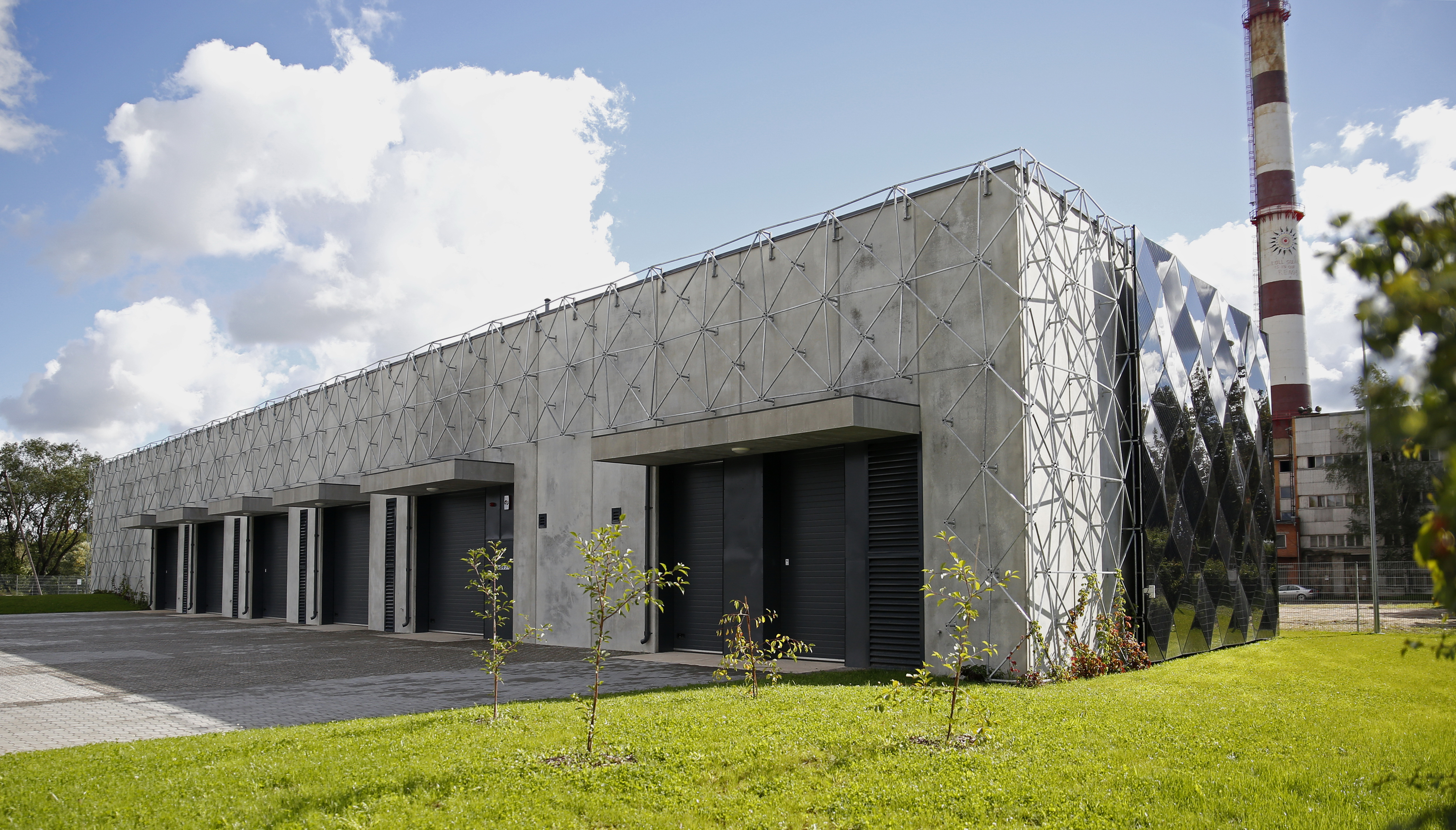 2016. aastal valminud Baltimaade esimene kaugjahutusjaam.